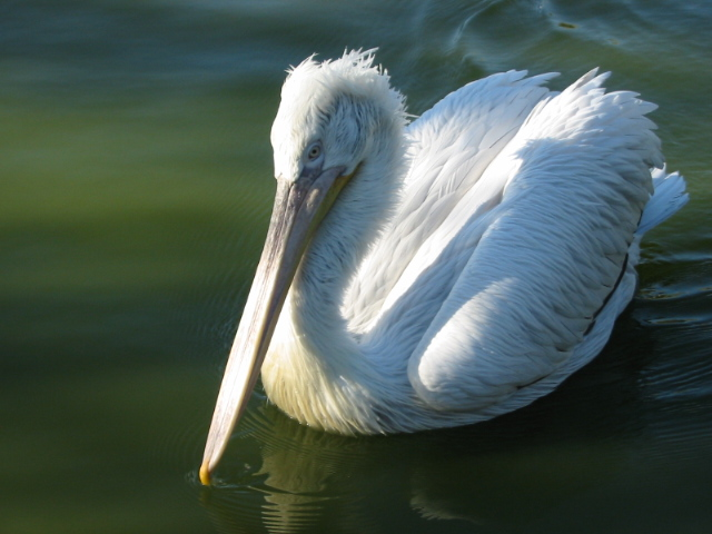 Pélicans des Dombes - France